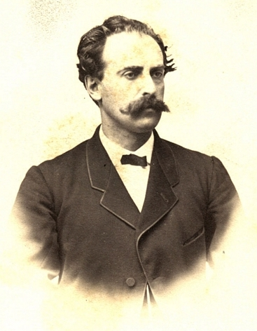 Manuel José Yrarrázaval (o Irarrázaval) Larraín (Santiago, Chile, 7 de noviembre de 1834 - Nueva York, Estados Unidos, 14 de febrero de 1896) fue un político y abogado chileno.